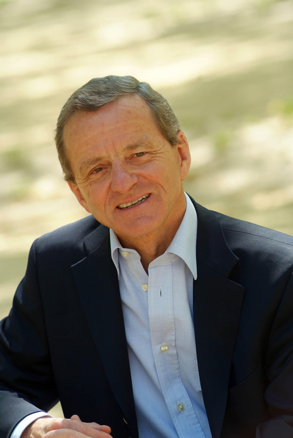 Photo Alain Carignon